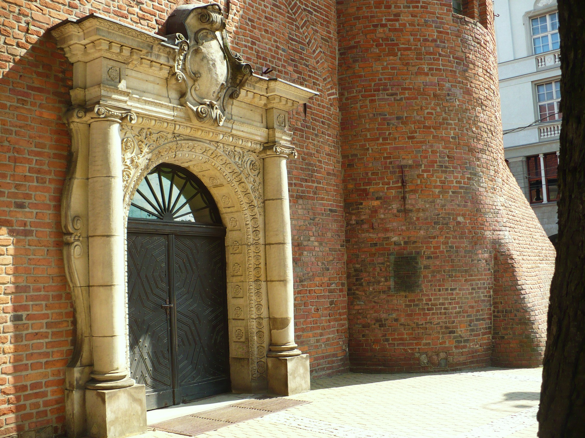 Neorenesansowy portal wejścia głównego